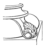 Eckblatt